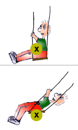 Schwerpunkt-Verschiebung beim Schaukeln Urheberin der Zeichnung (lp) und Bearbeiter der Zeichnung (Anton (rp)) gestatten Lizenzierung unter GNU-FDL (2005).